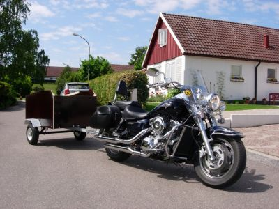 2004 års Kawasaki Vulcan 1600 Classic, här med släp.